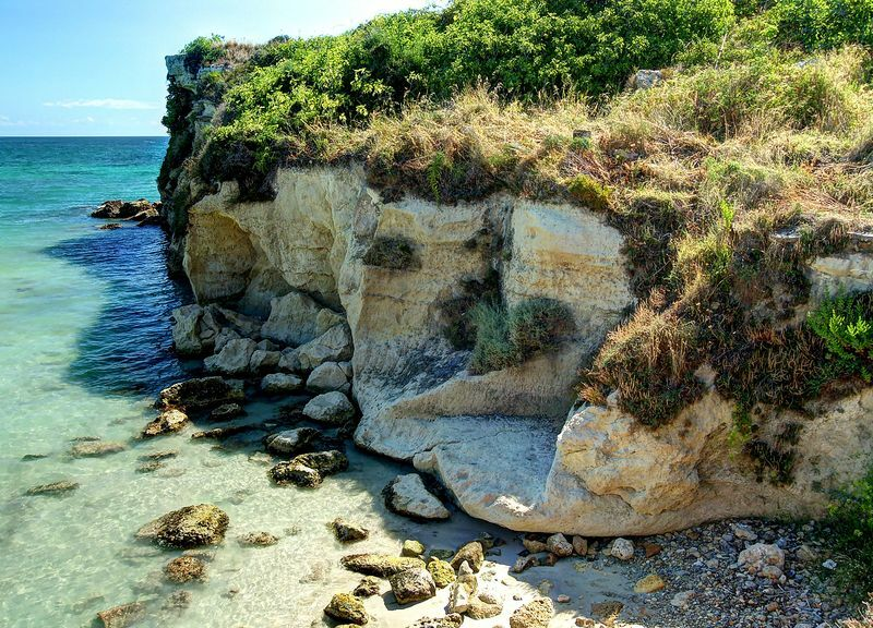 Scogliera di Fontane Bianche, Sicilia